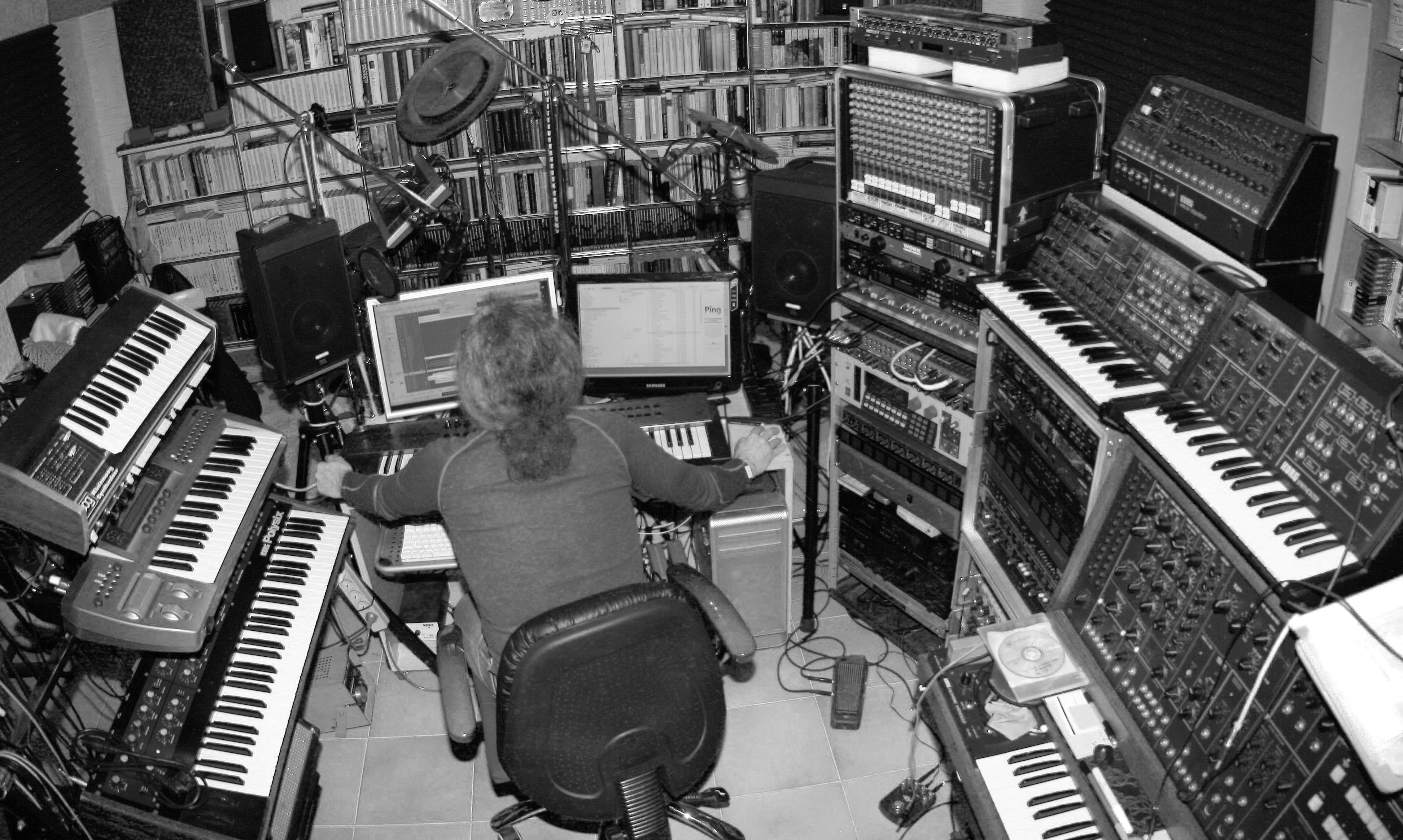 Ensayando las canciones del último disco